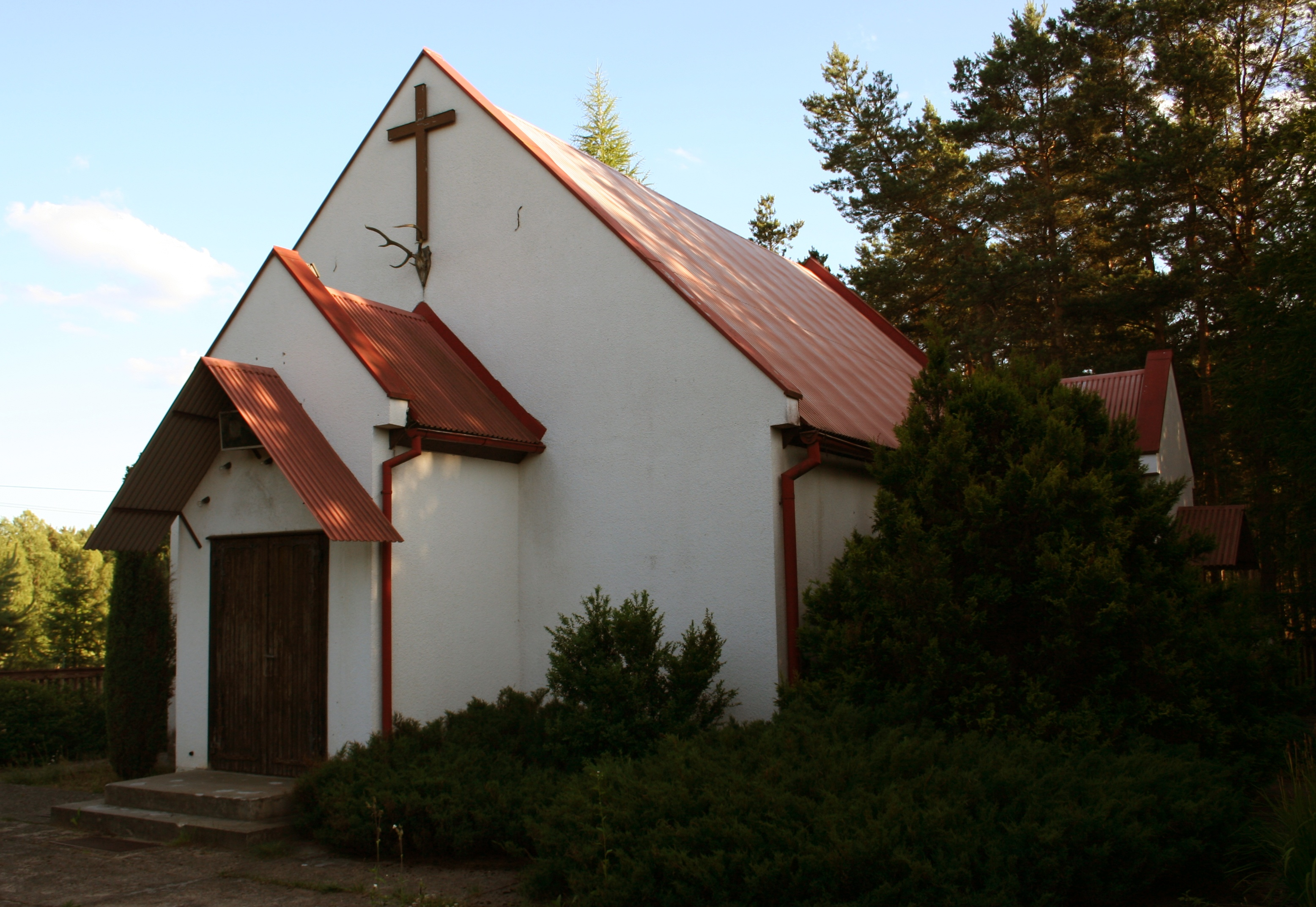 Kaplica św. Huberta w miescowości Okoniny, gmina Śliwice, woj. kujawsko-pomorskie